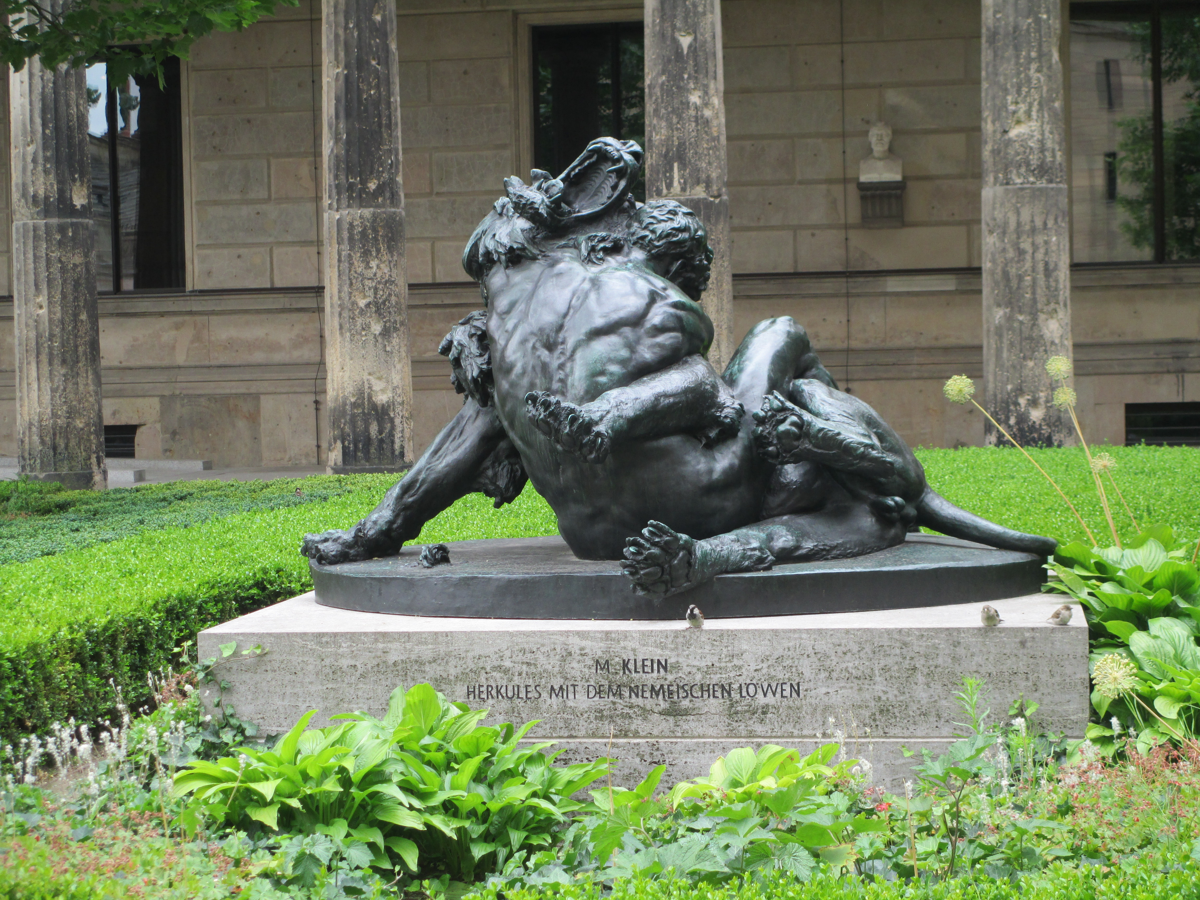 פסל הרקולס והאריה הנימאי באי המוזיאונים בברלין